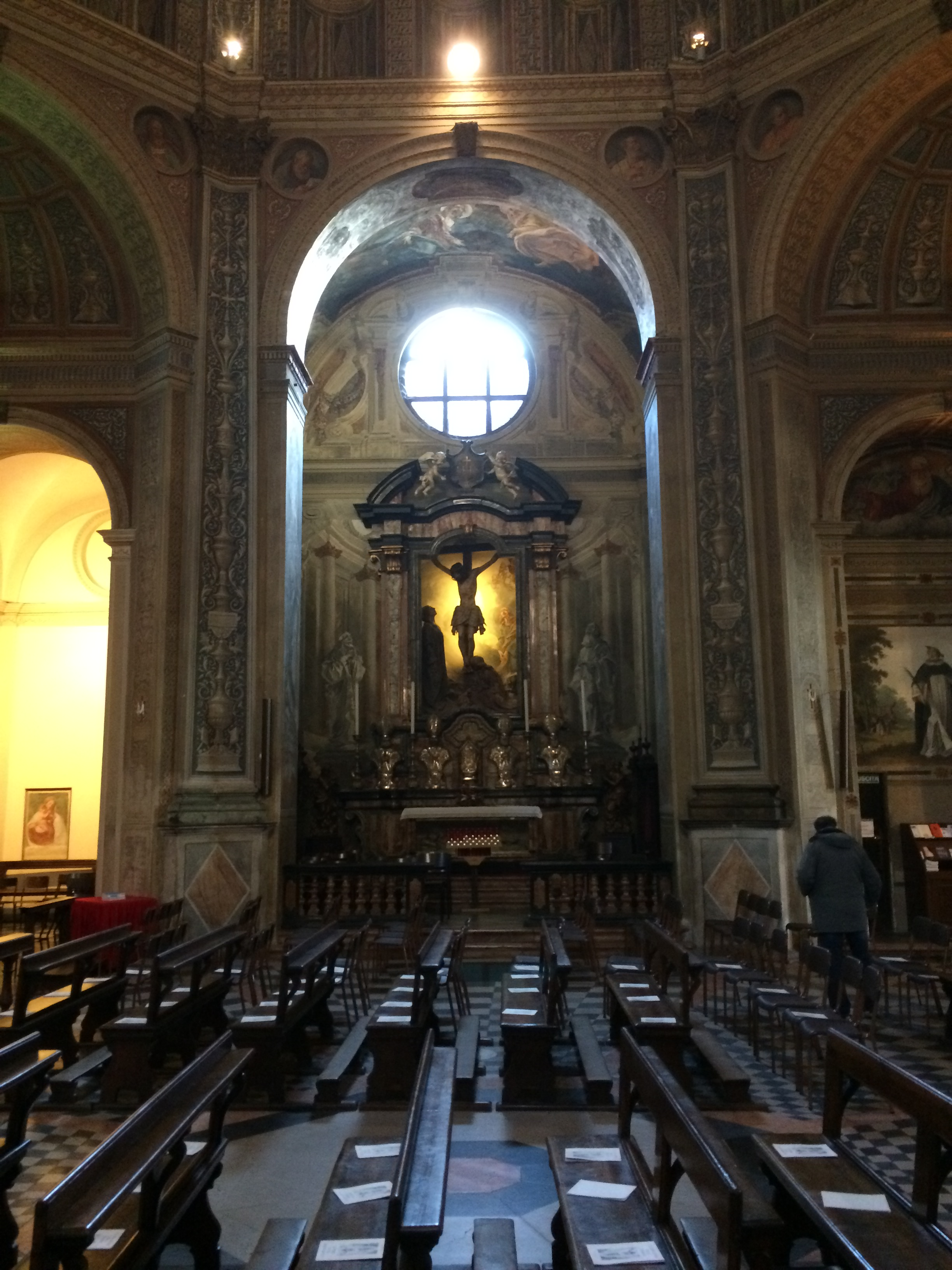 Cappella del Santo Crocifisso - Basilica di San Magno (Legnano)